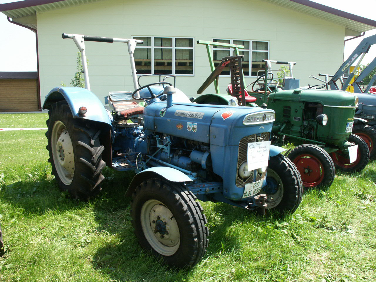 Fordson Super Dexta (Baujahr 1964, 36-PS-Motor)